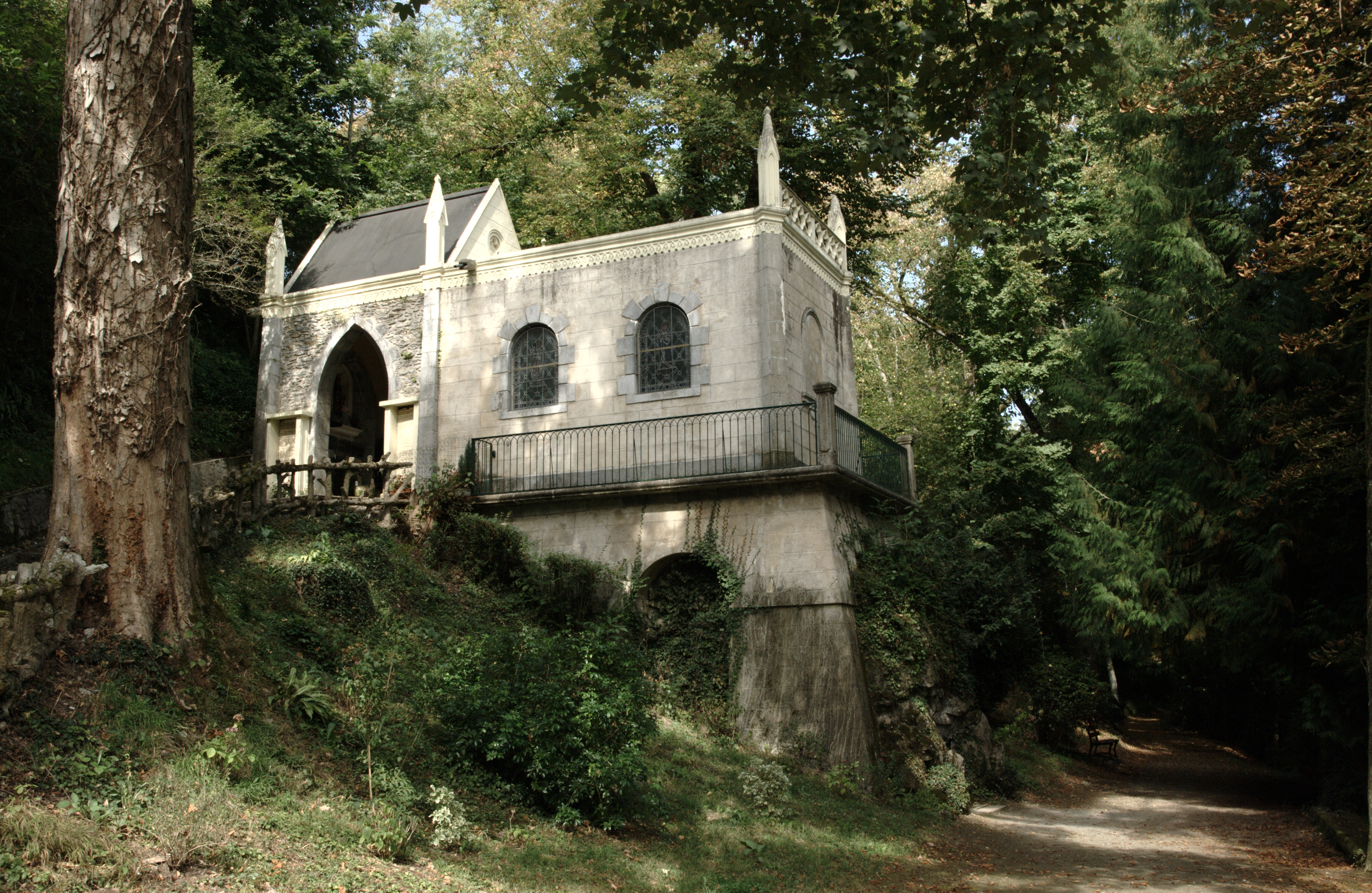 L'ermitage de St cénéré sur les rives de l'Erve, commune de Saulges en Mayenne.